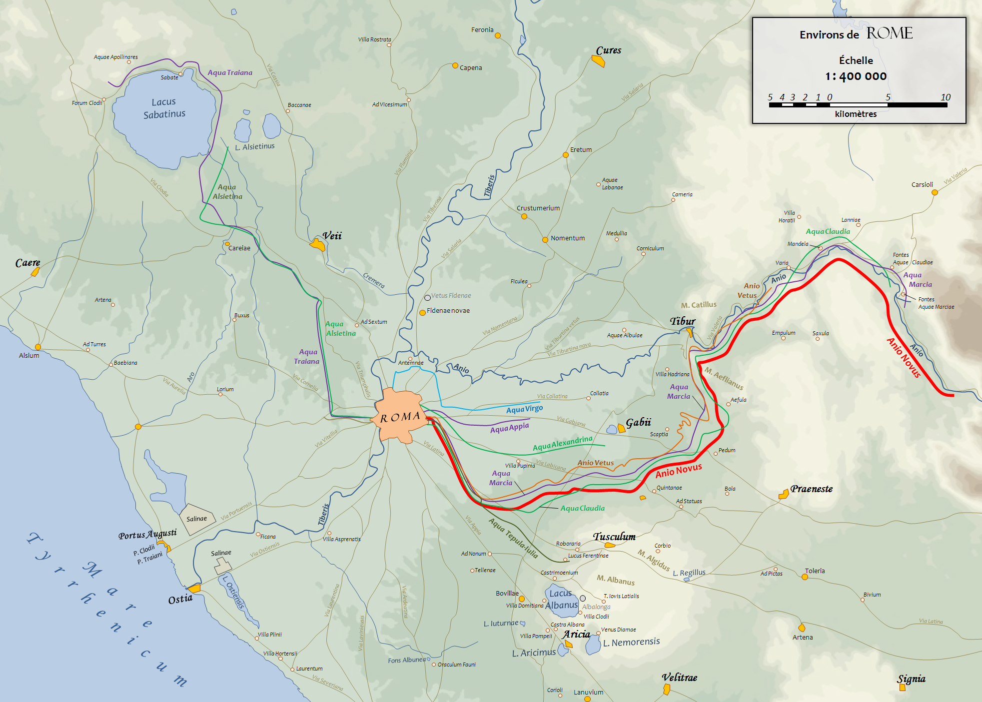 Carte du Latium antique sur lequel figure le tracé des aqueducs de Rome. D'après un fond de carte de 1886 (G. Droysens Allgemeiner Historischer Handatlas).